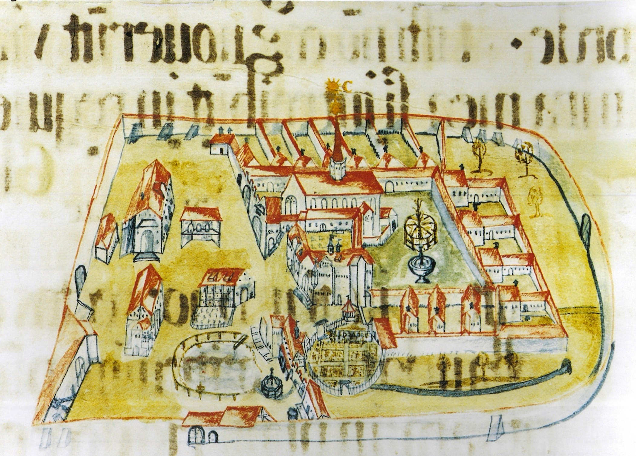 Kartause Ittingen um 1640, aus der Handschrift Agio Melos; eine der ältesten Ansichten